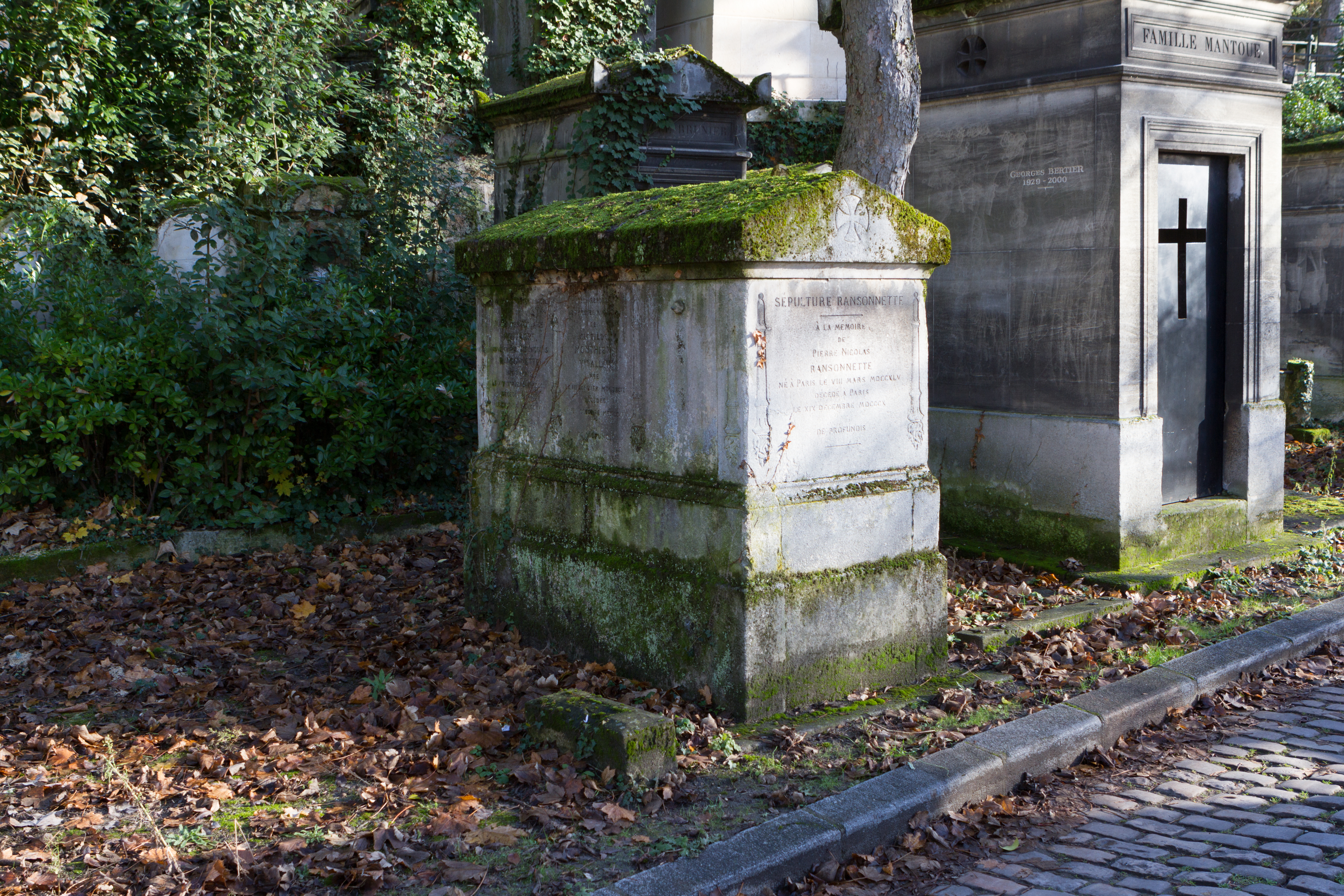 Sépulture de Charles Ransonnette (1793-1877), dessinateur et graveur.